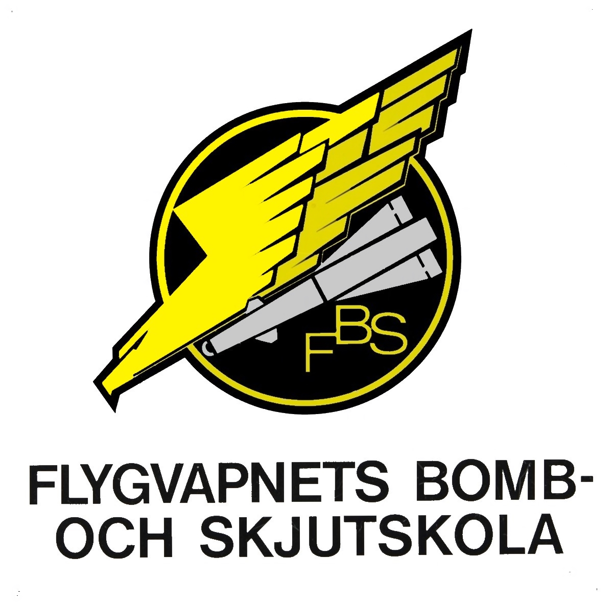 Flygvapnets bomb- och skjutskolas/Flygvapnets befälsskola/Flygbefälsskolan (FBS) emblem. Motiv: robotbeväpnad örn, som symboliserar utbildning och ny vapenteknik.